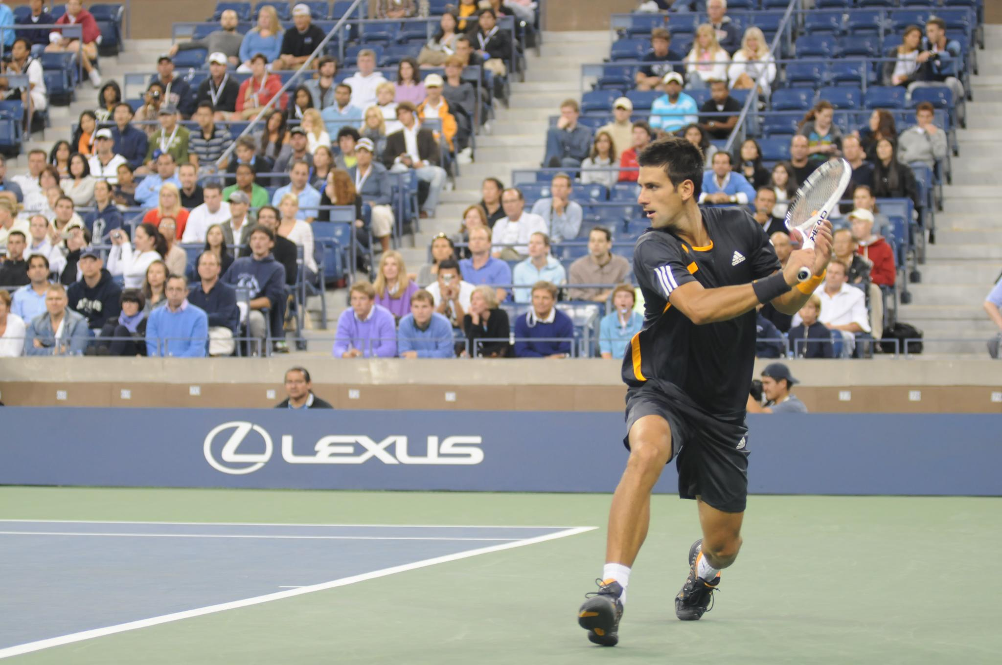 Novak Đoković at the 2009 US Open